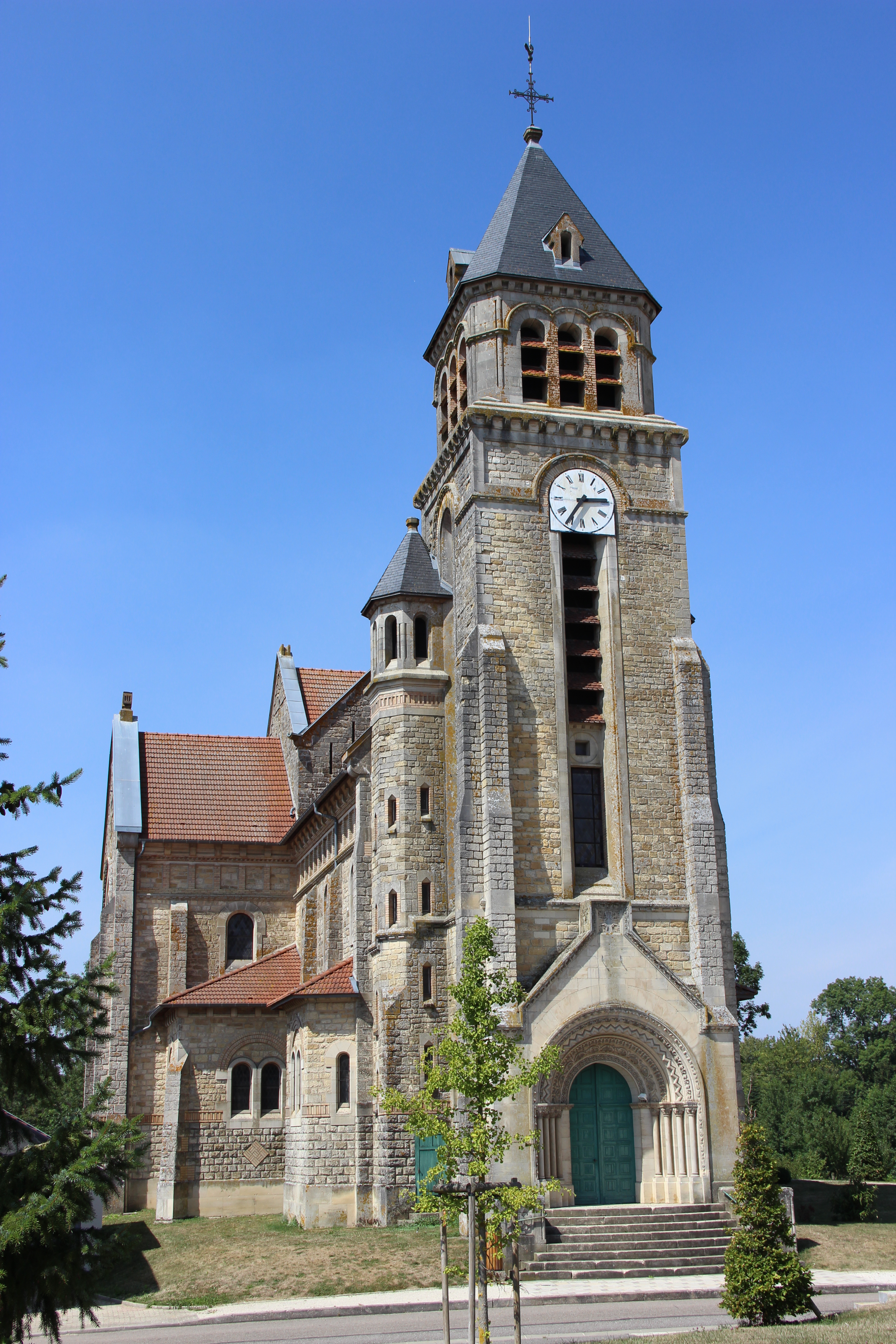 L'église